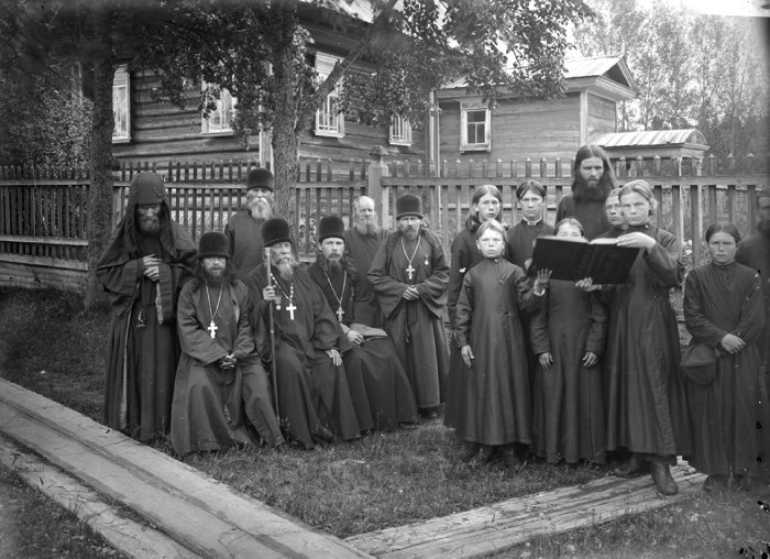 Благовещенский Керженский единоверческий монастырь. Группа монахов с настоятелем Филаретом. Семеновский уезд. (1897) Место съемки: Семеновский уезд, Нижегородская губерния Место хранения: Архив аудиовизуальной информации Нижегородской области